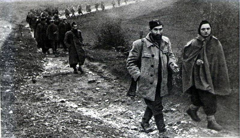 Srpskohrvatski / српскохрватски: Kolona delegata dolazi na zasedanje AVNOJ-a u Jajcu 1943. godine. U prvom planu pop Vlada Zečević i Mitra Mitrović, većnici iz Srbije.